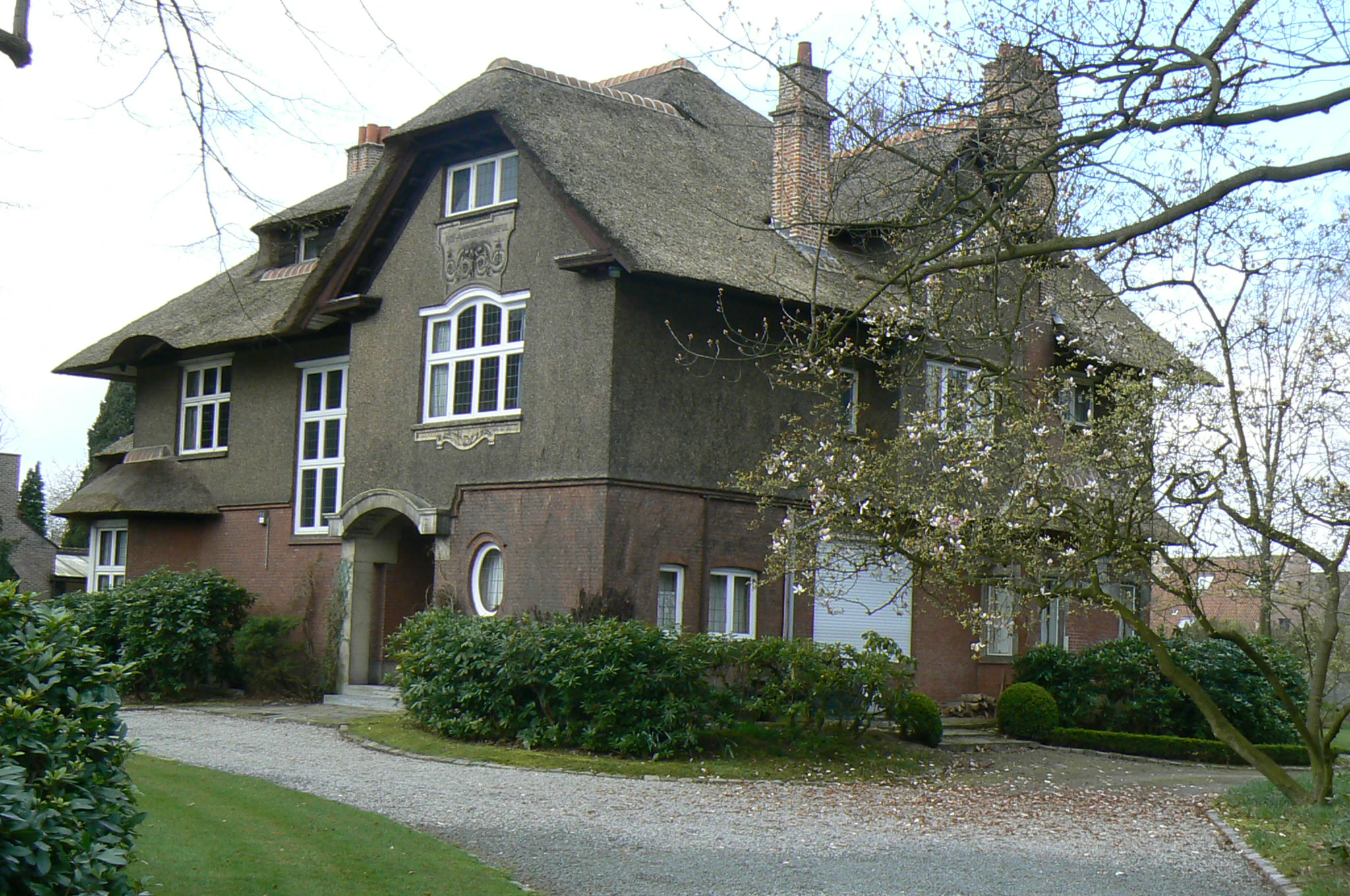 Kontich (prov. Antwerpen, België). Villa Rest and be thankful, Antwerpsesteenweg.